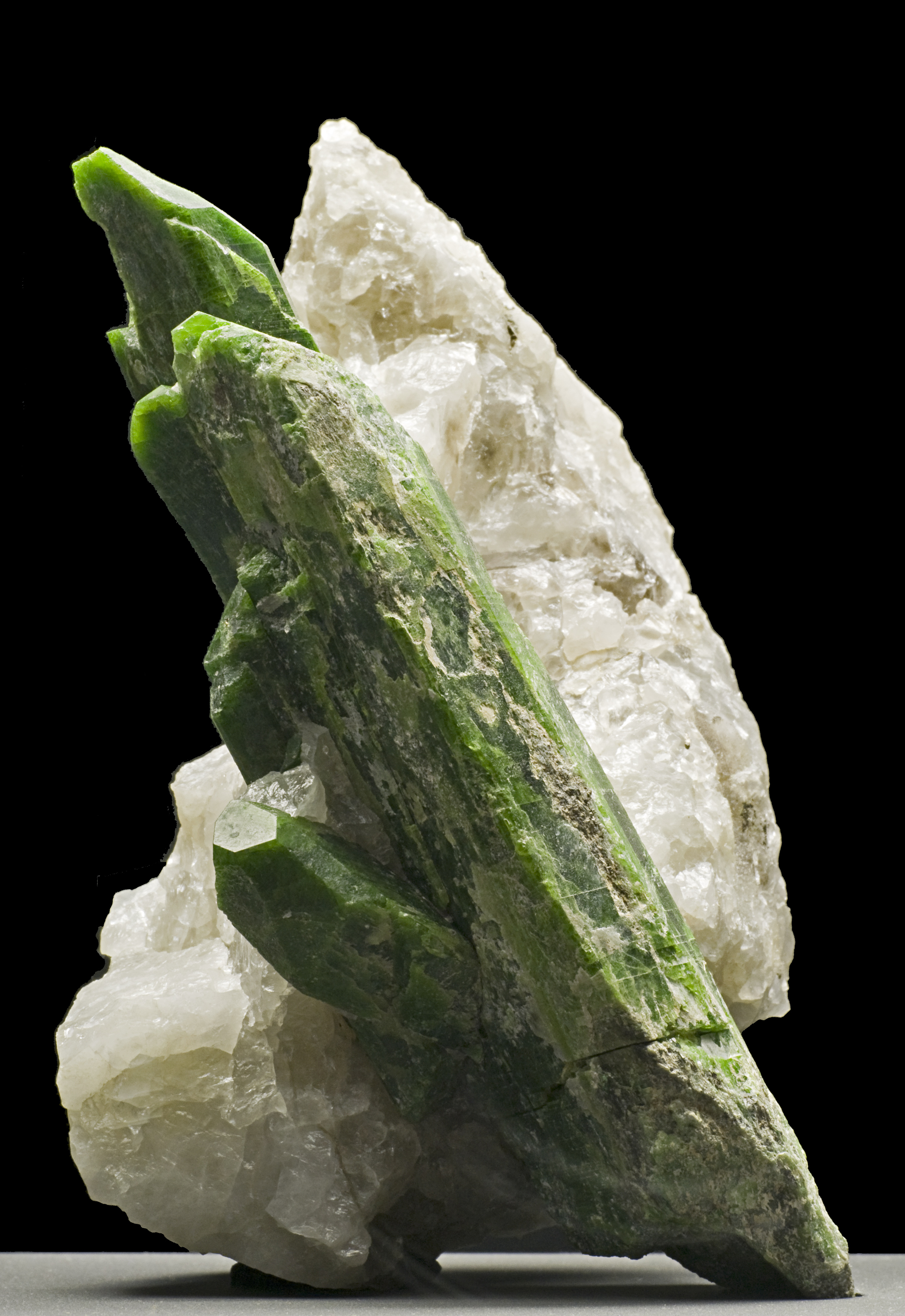 Mineraliensammlung des Naturmuseums Senckenberg Chrom-Diopsid